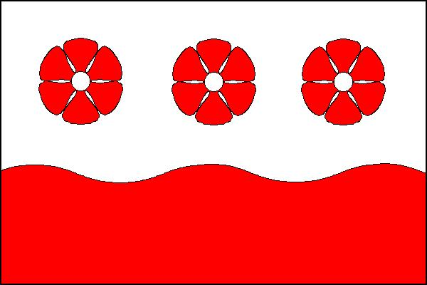 Vlajka obce Stará Červená Voda